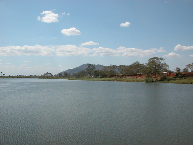 Shire Fluss in Malawi fotografiert in Liwonde nahe dem gleichnamigen Nationalpark.